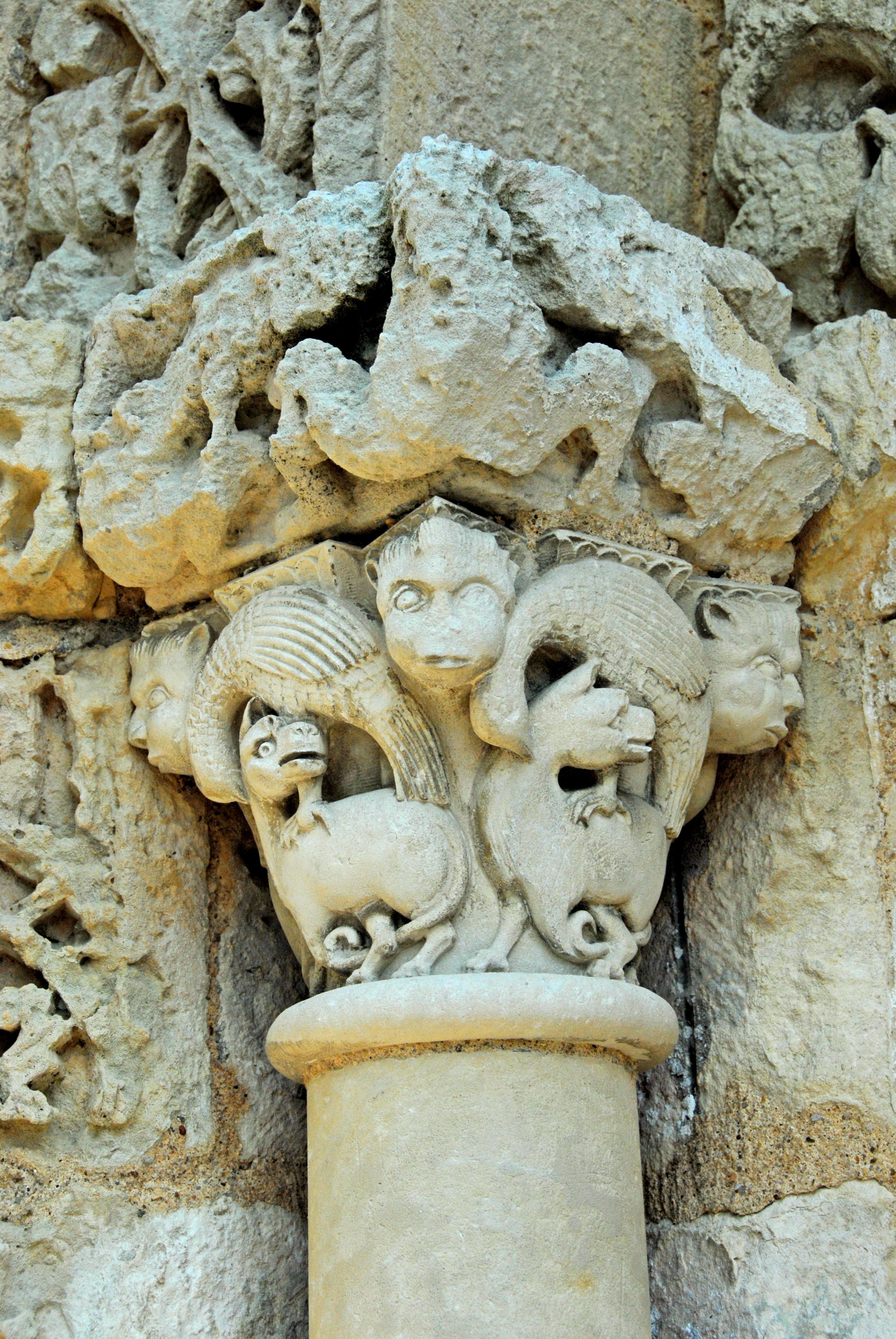 Avy, Kapitell, links vom Portal